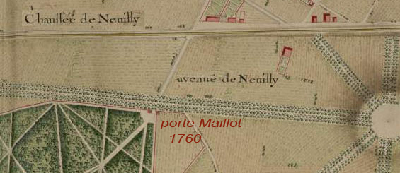 La porte Maillot extrait archim carte partielle de l'Ouest de Paris en 1760, sur